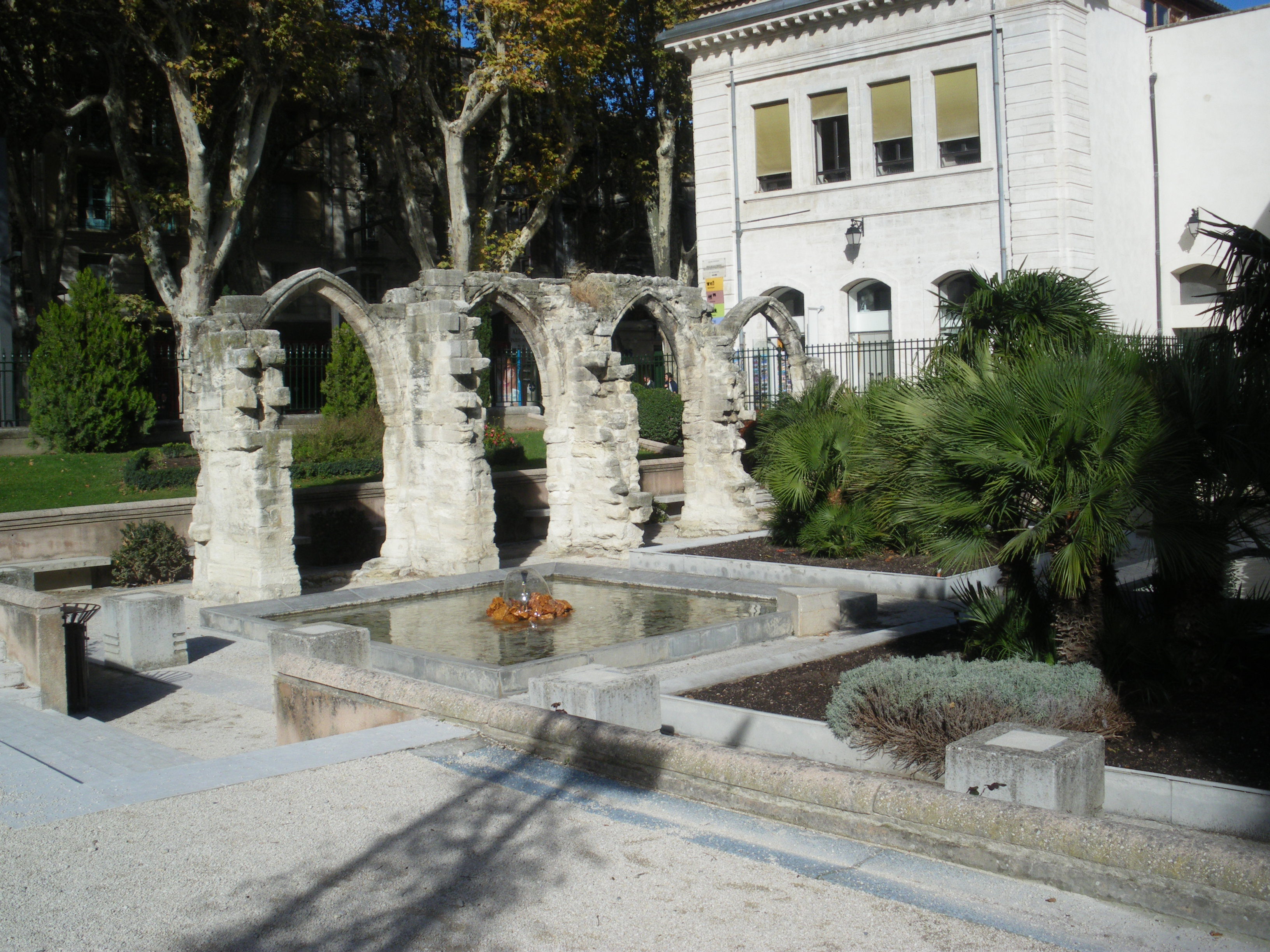 Square Agricol Perdiguier, Avignon, Vaucluse, France